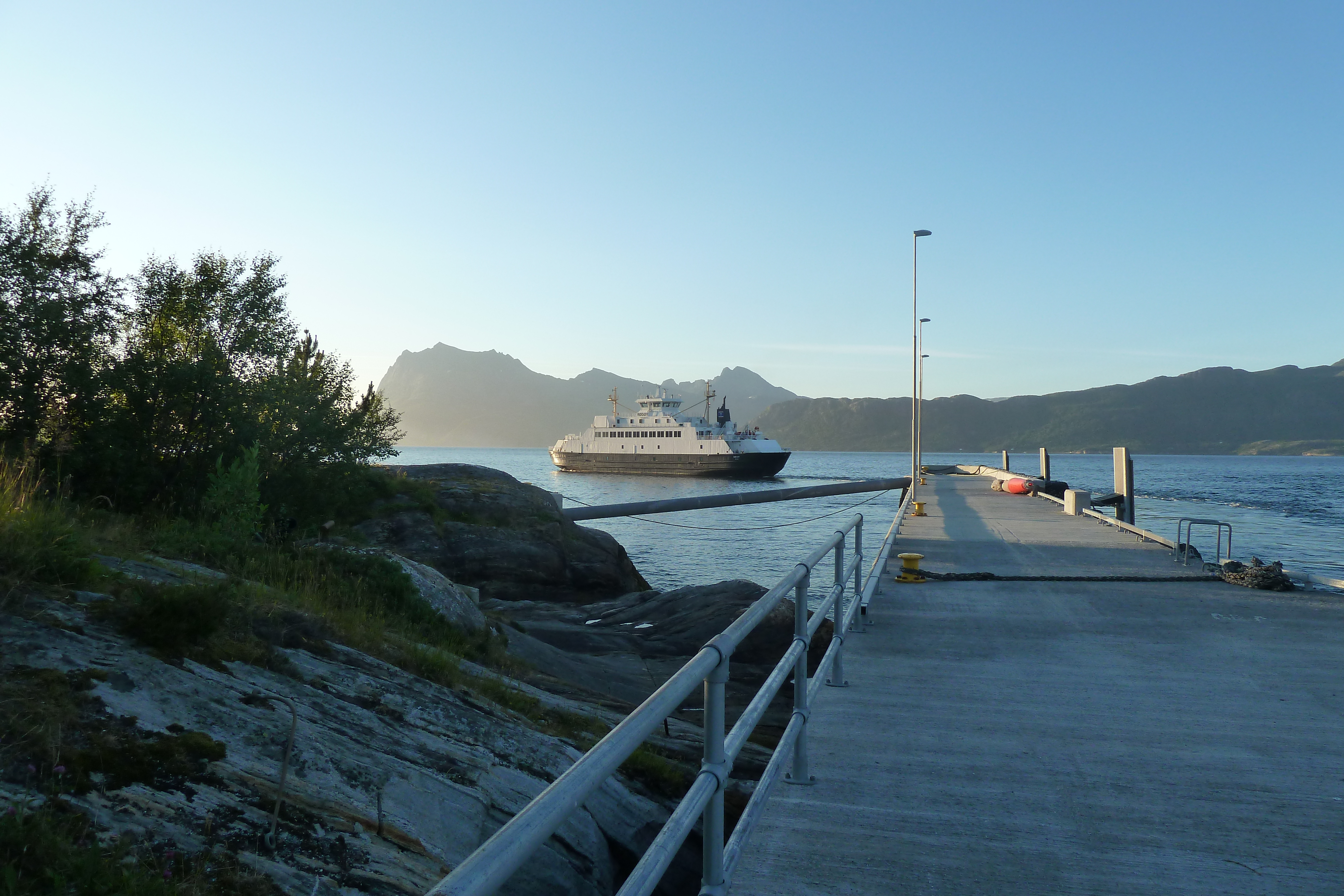 MF 'Rødøy' (IMO 9030357) forlater Kilboghavn fergekai.